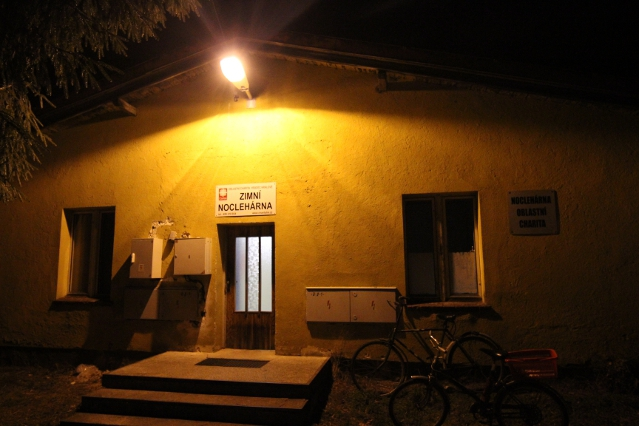 Zimní noclehárna v areálu veřejného letiště.